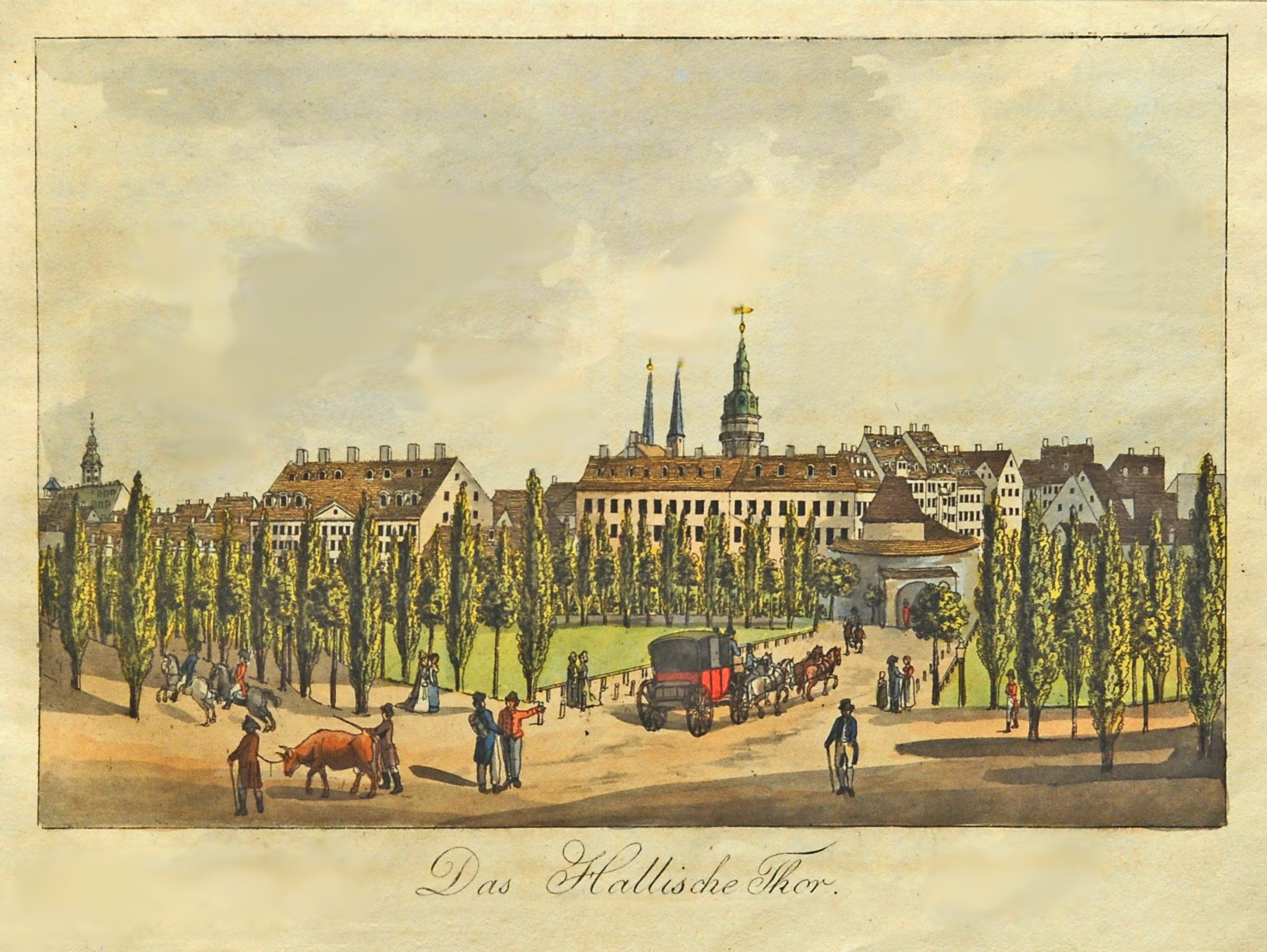 Leipzig 1804 Das Hallische Tor Aquarellierter Kupferstich 15,5 x 21 cm (Plattenrand) aus: Schwarz, Karl Benjamin: Romantische Gemählde von Leipzig. Eine Folge von vier und zwanzig Prospecten gezeichnet und gestochen von Karl Benjamin Schwarz. Leipzig: Karl Tauchnitz 1804, 56 S. + 23 aquarellierte Kupfertafeln + 1 nicht kolorierter Stich. Carl Benjamin Schwarz: Vedutenstecher, Zeichner, Radierer, Farbstecher und Aquarellist (*1757 Leipzig, † 21.10.1813 ebenda). Schüler Oesers; Kustos an der Winklerschen Kunstsammlung (THIEME-BECKER Bd. 30, S. 365).